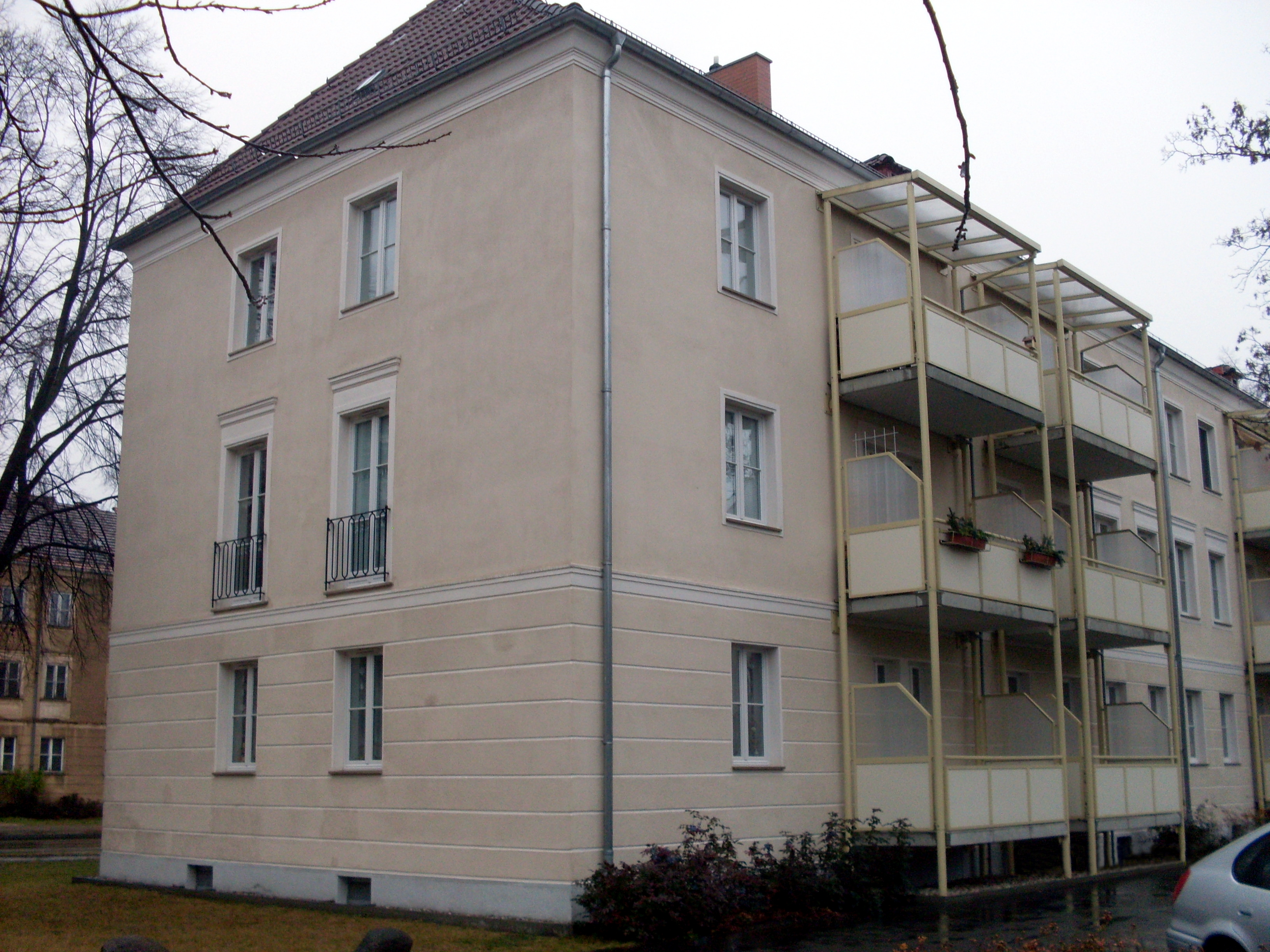 Franz-Mehring-Straße Str. 40-41 (Rückansicht) in Cottbus, Teil der denkmalgeschützten Großwohnsiedlung Sandow